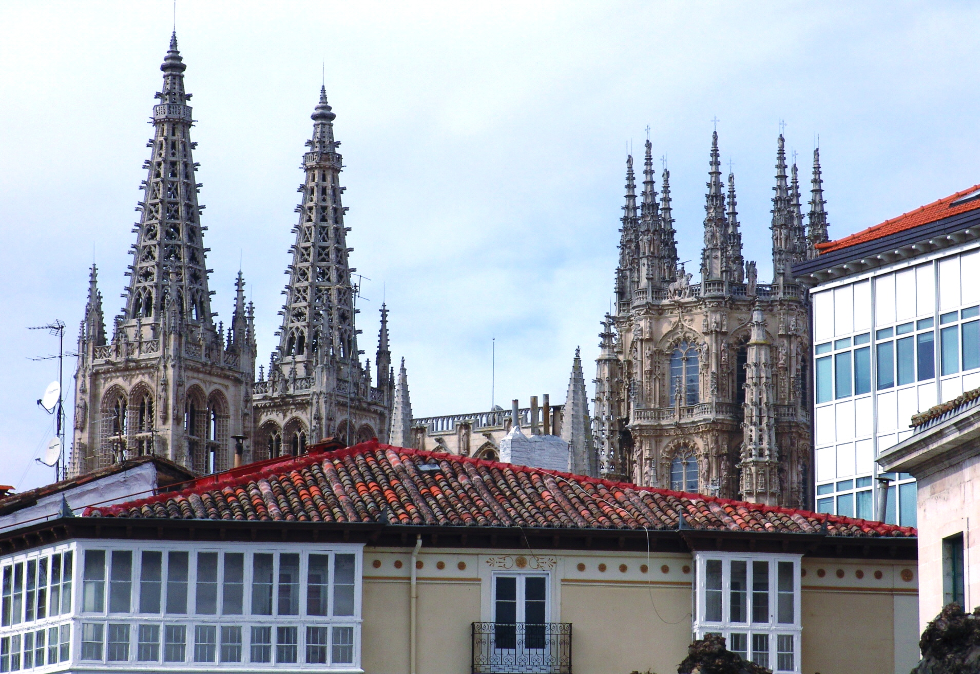 Vista de la Catedral desde el Paseo del Espolón. Burgos, España.